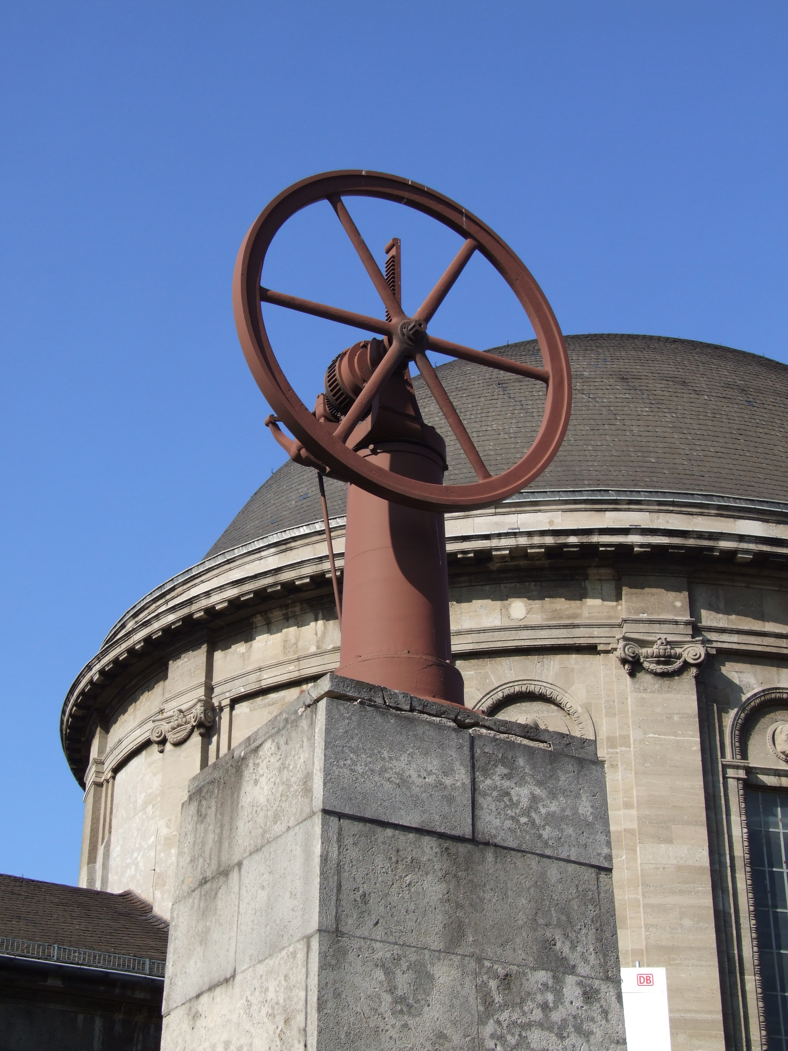 Denkmal Nicolaus Otto Koeln-Deutz This is a photograph of an architectural monument.